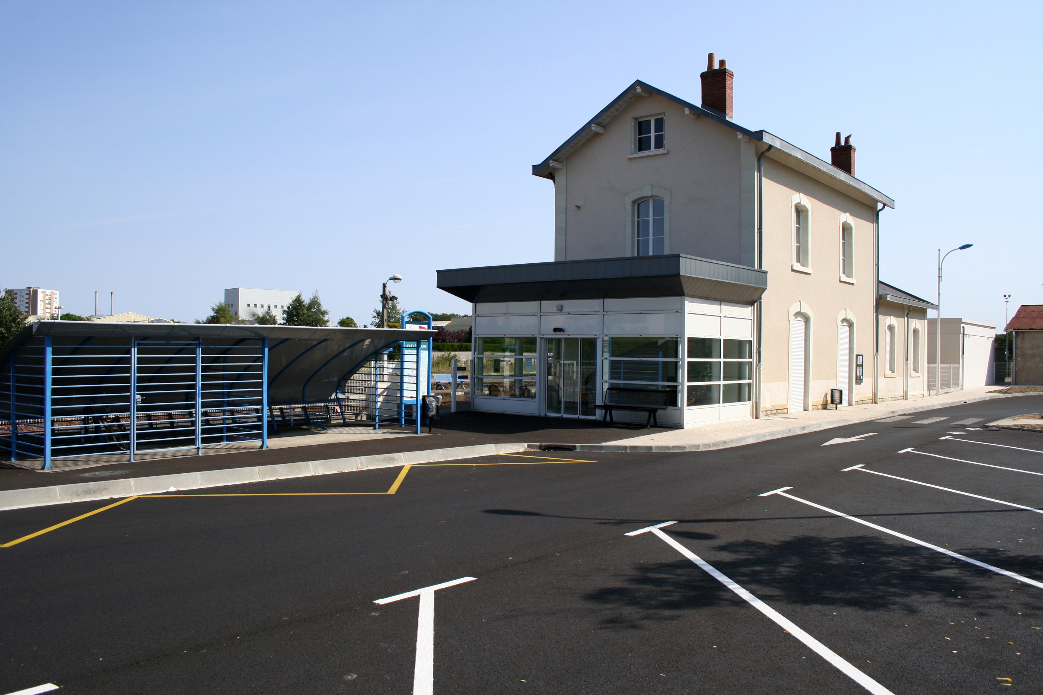 Façade de la gare